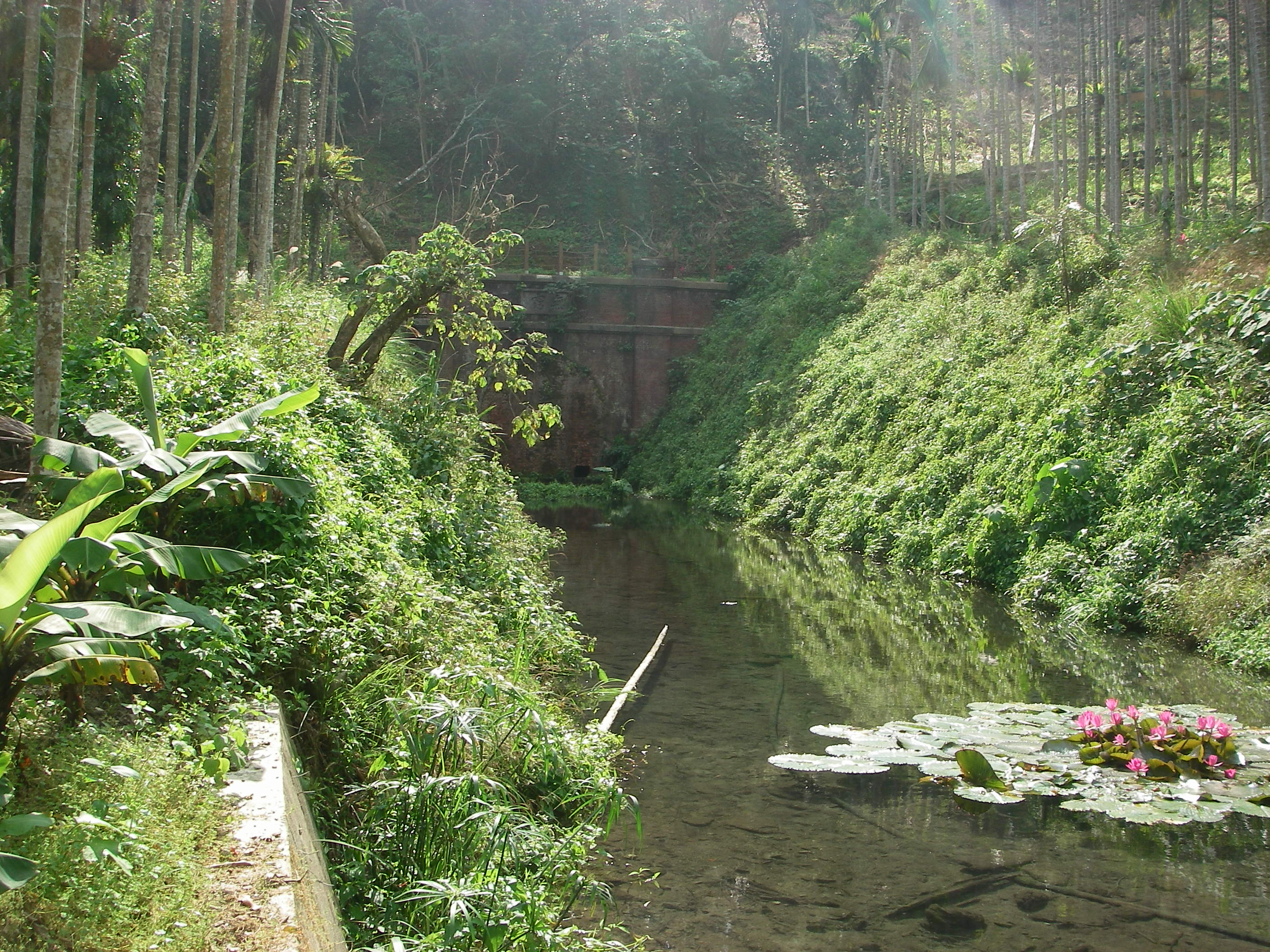 中文（台灣）: 掃叭隧道北口今貌。原路基已成水池。